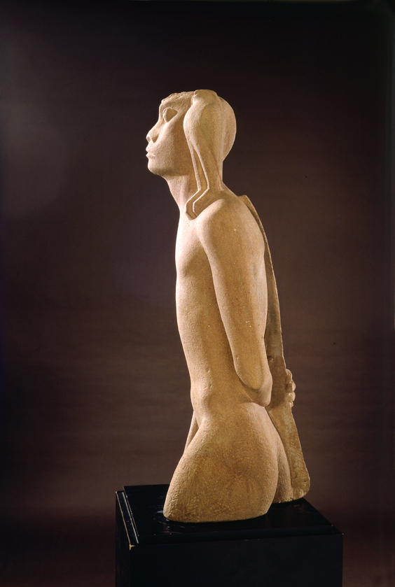 Sculpture